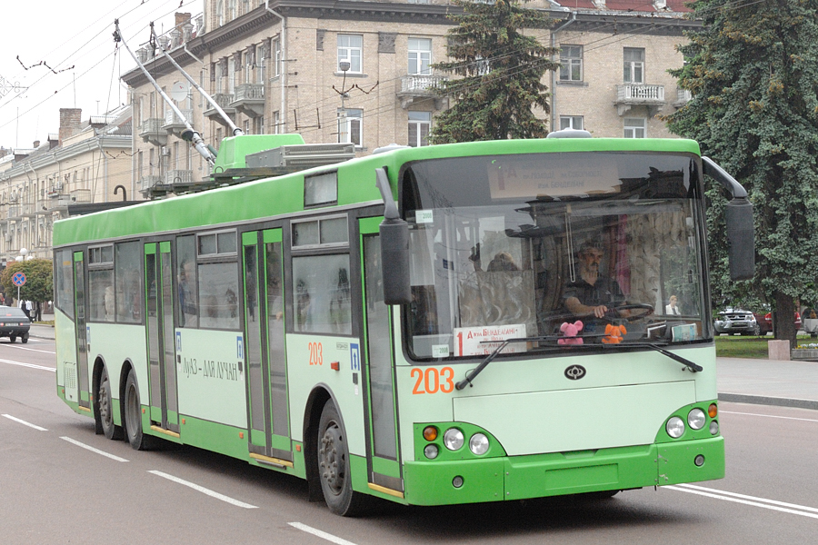 Bohdan E231 203 in Luzk